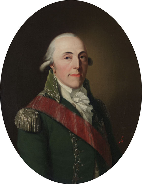 Alexius Friedrich Christian, Fürst von Anhalt-Bernburg